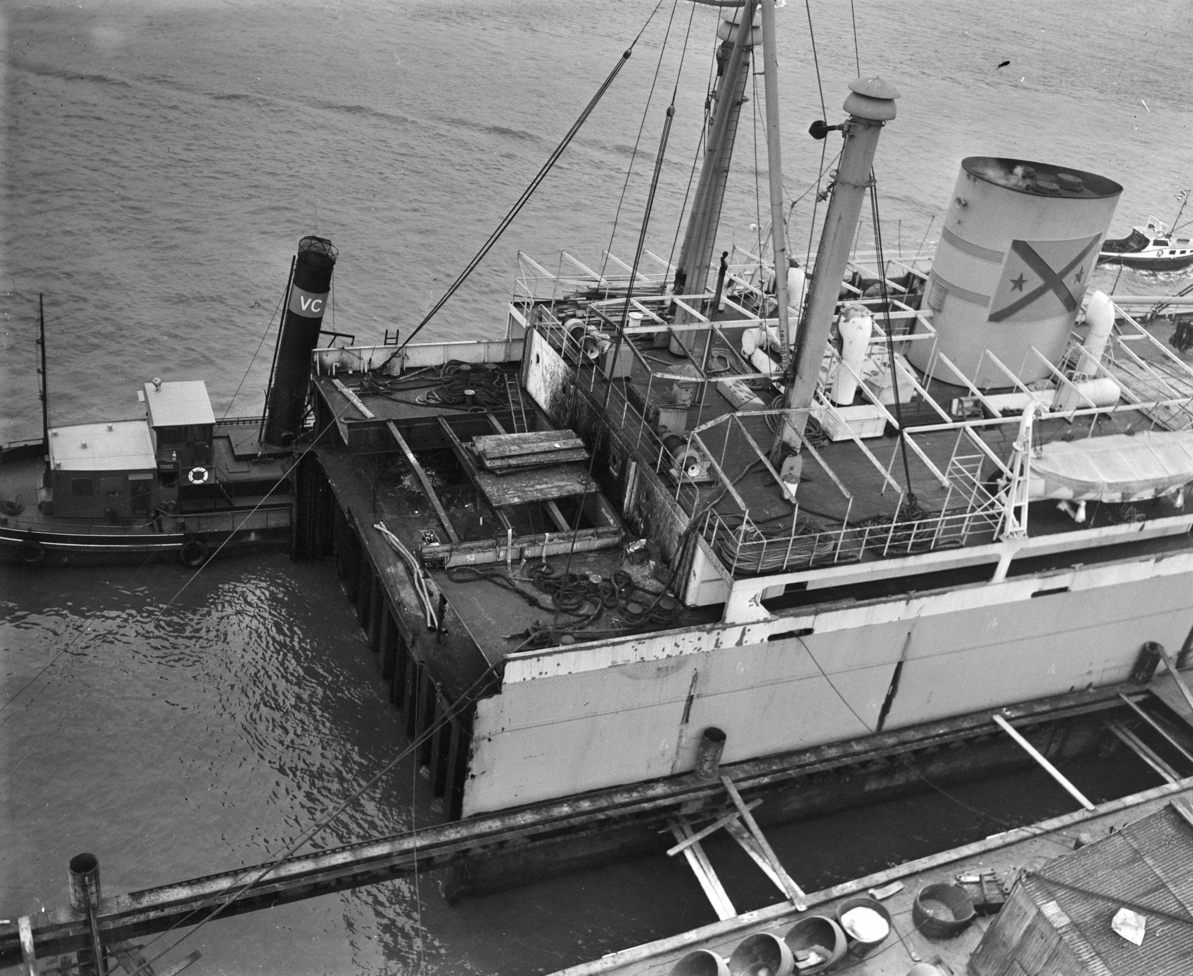 Collectie / Archief : Fotocollectie Anefo Reportage / Serie : [ onbekend ] Beschrijving : Het Zwitserse Ms. Nyon" is bij Bolnes binnengesleept Datum : 4 februari 1959 Locatie : Bolnes Instellingsnaam : MS Nyon Fotograaf : Behrens, Herbert / Anefo Auteursrechthebbende : Nationaal Archief Materiaalsoort : Negatief (zwart/wit) Nummer archiefinventaris : bekijk toegang 2.24.01.04 Bestanddeelnummer : 910-1385